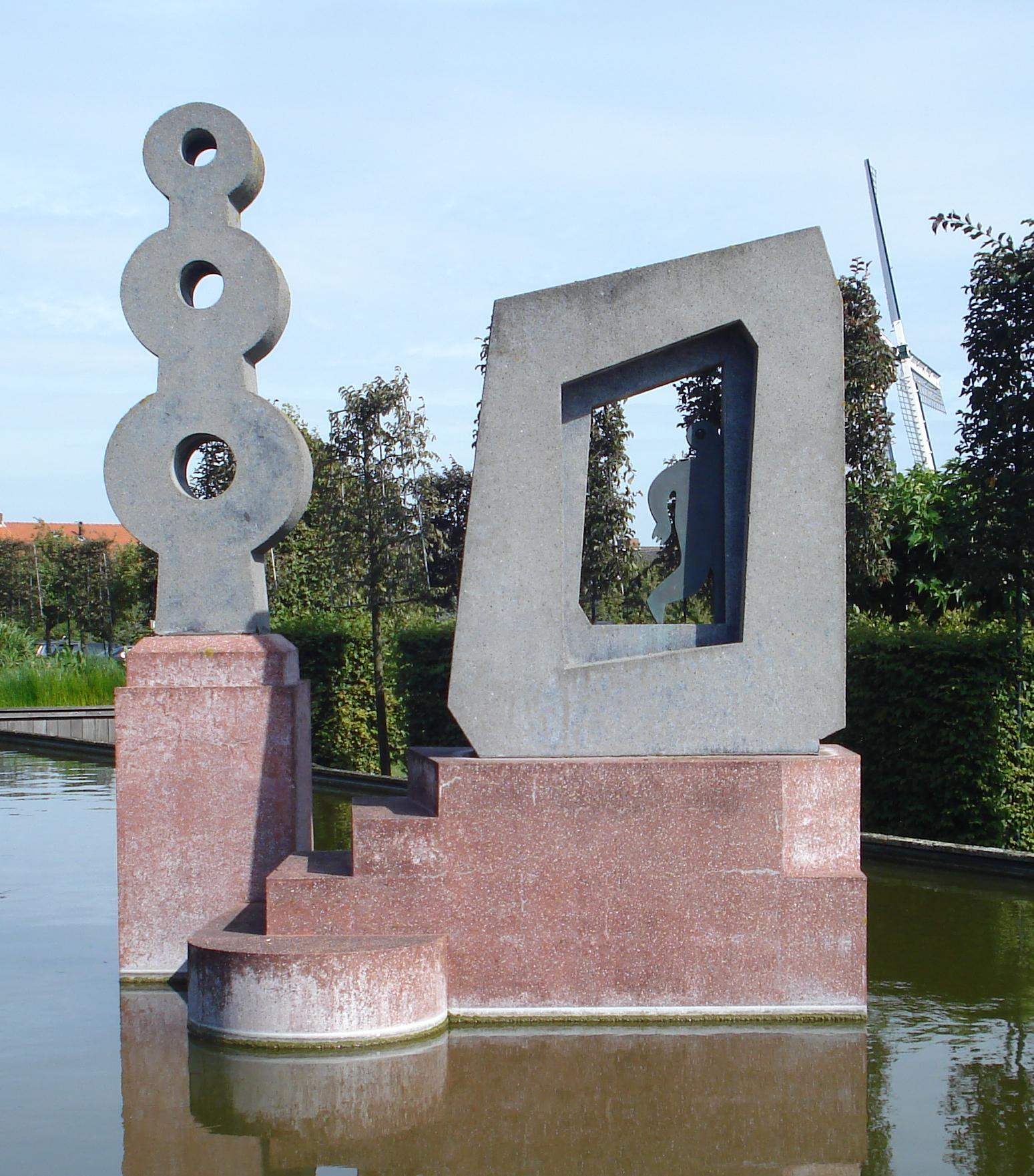 Westland, s-Gravenzande, Naaldwijkseweg, Beukenhage. Indië-monument Beukenhage van Steef Roothaan. The Netherlands. FOP.